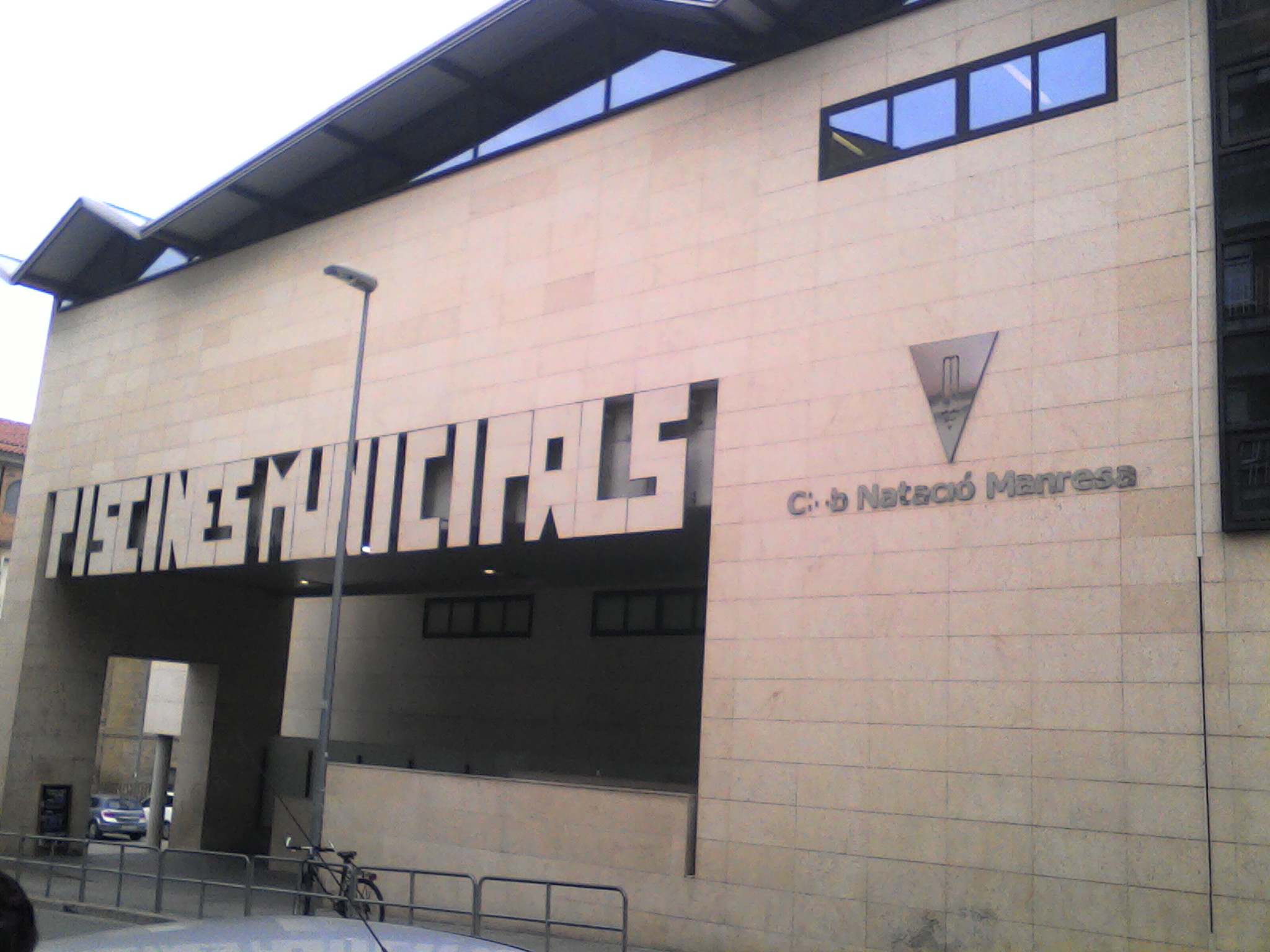 Façana instal·lacions Municipals del CN Manresa.